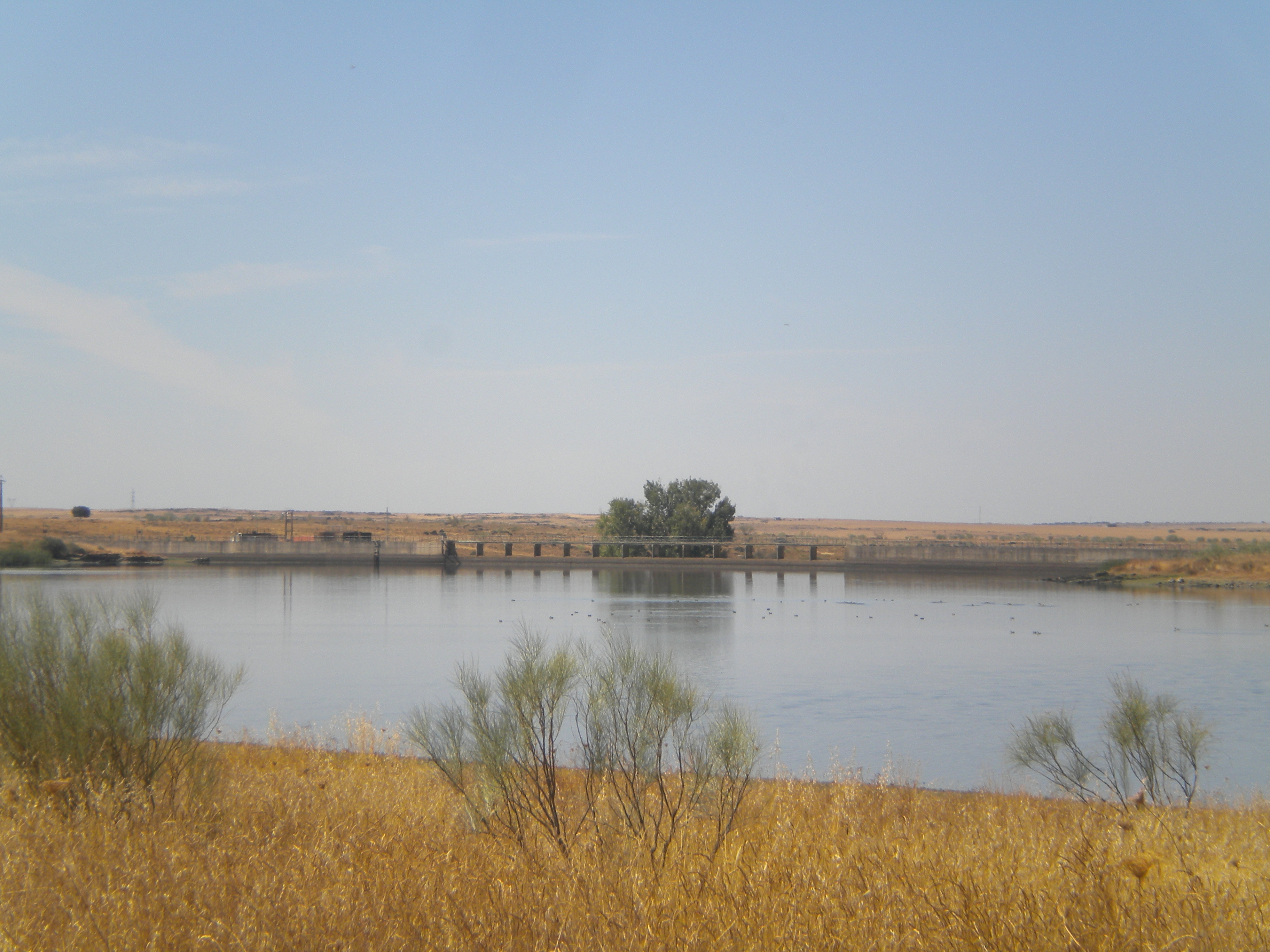 Presa en el arroyo Talaván (Extremadura, España)